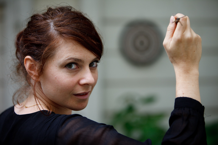 Mélanie Pain (chanteuse), Paris